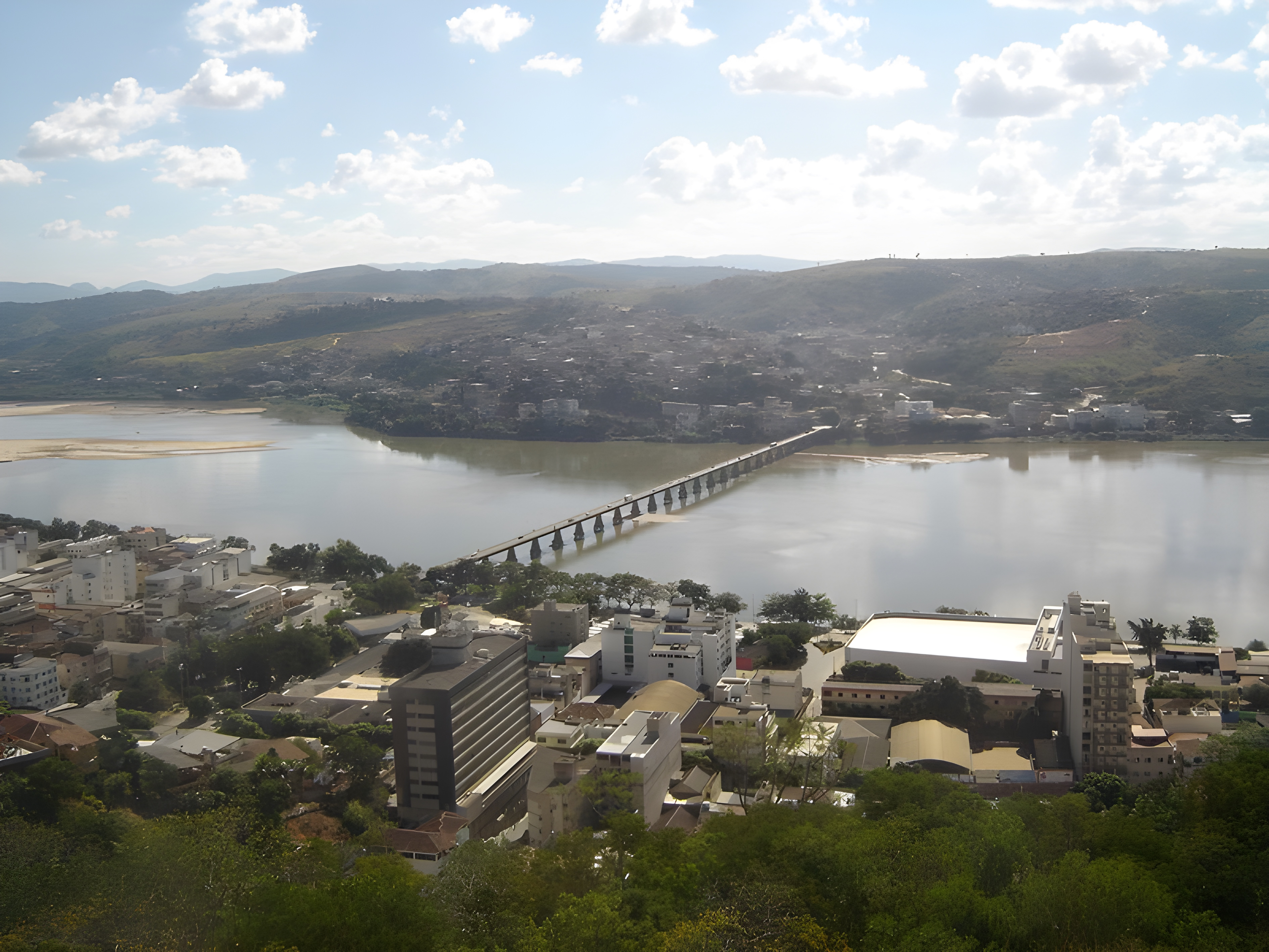 Panoramica de Colatina